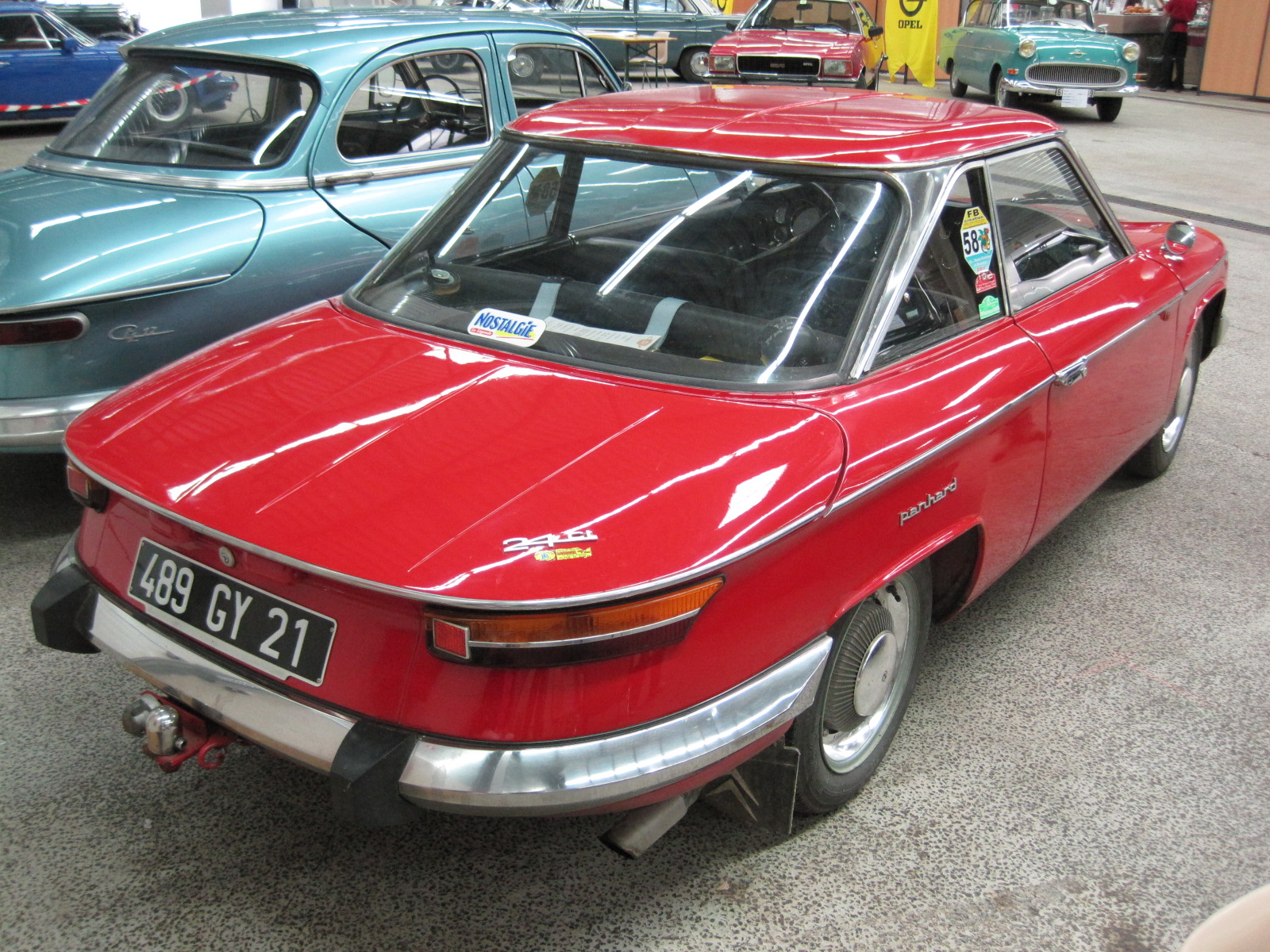 Panhard 24CT modèle 1964